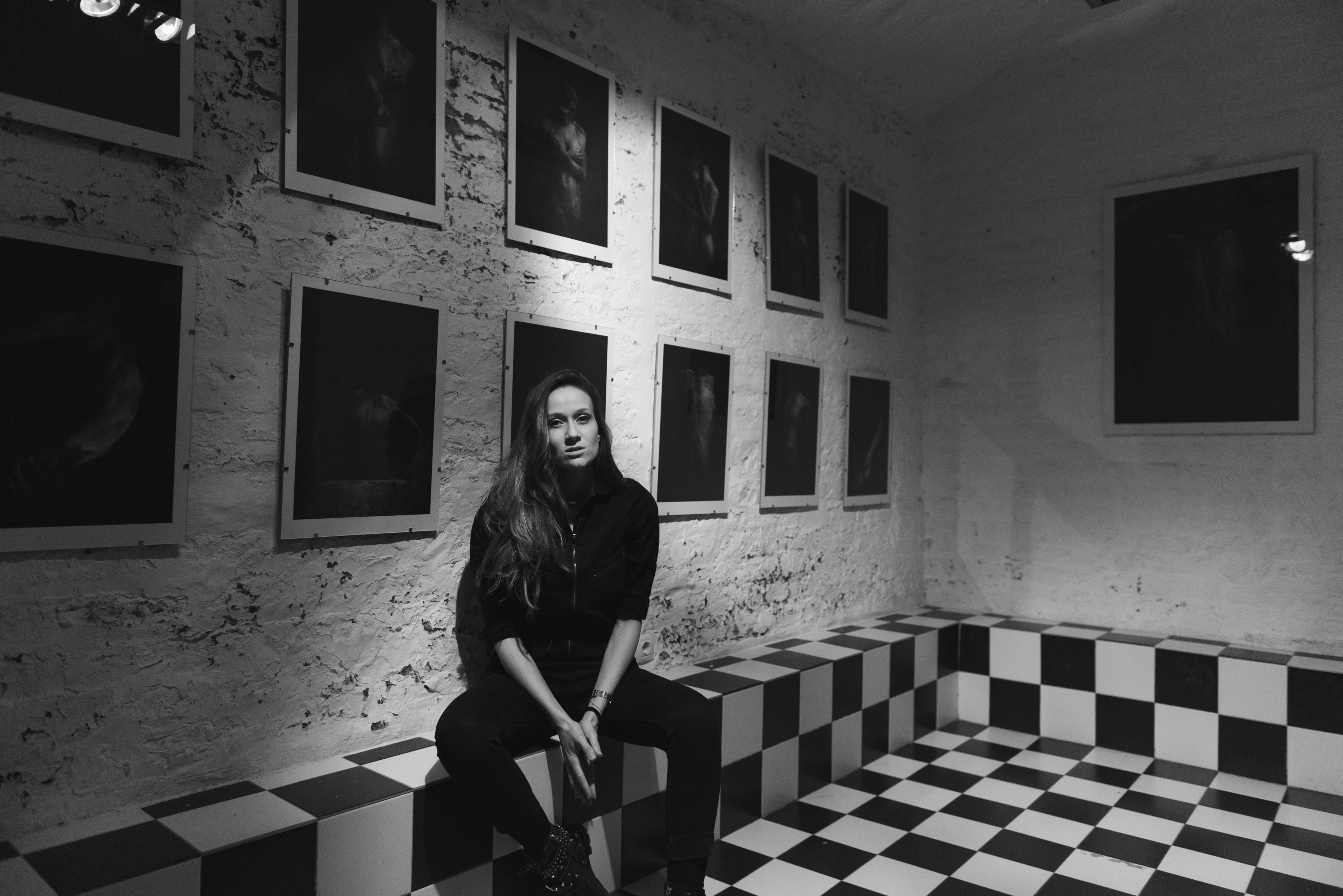 Srpskohrvatski / српскохрватски: Natalija Miladinović na izložbi Fidelium pored svoga rada Metamorfoza u kući Kralja Petra I